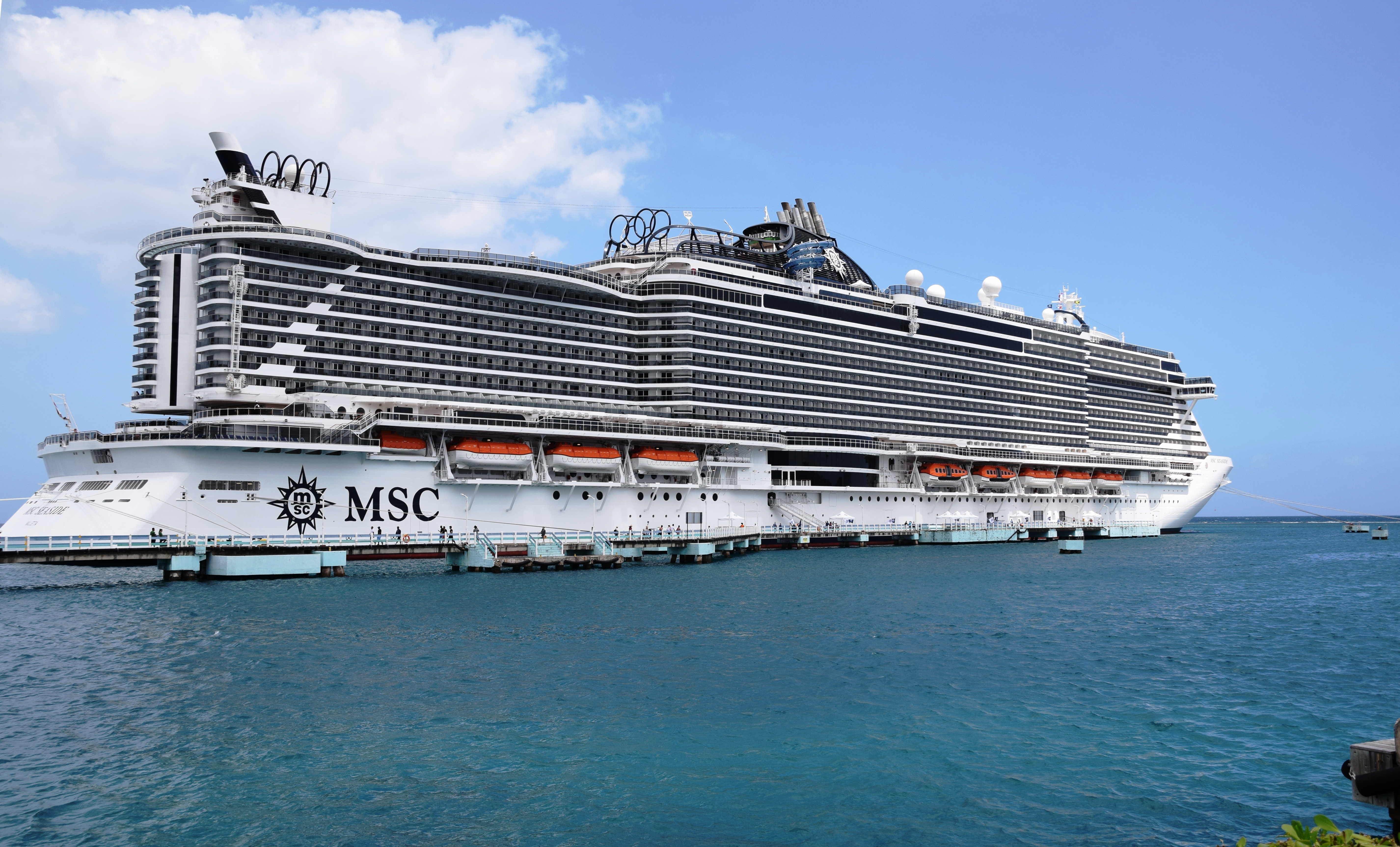 MSC Seaside